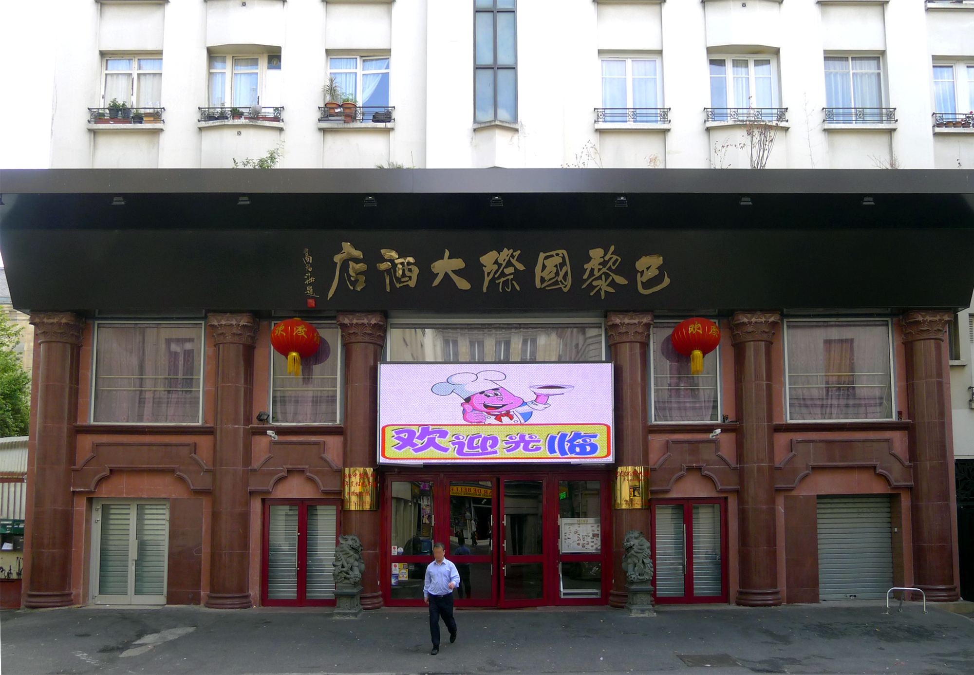 Rue de Belleville (n° 46) - Paris XX